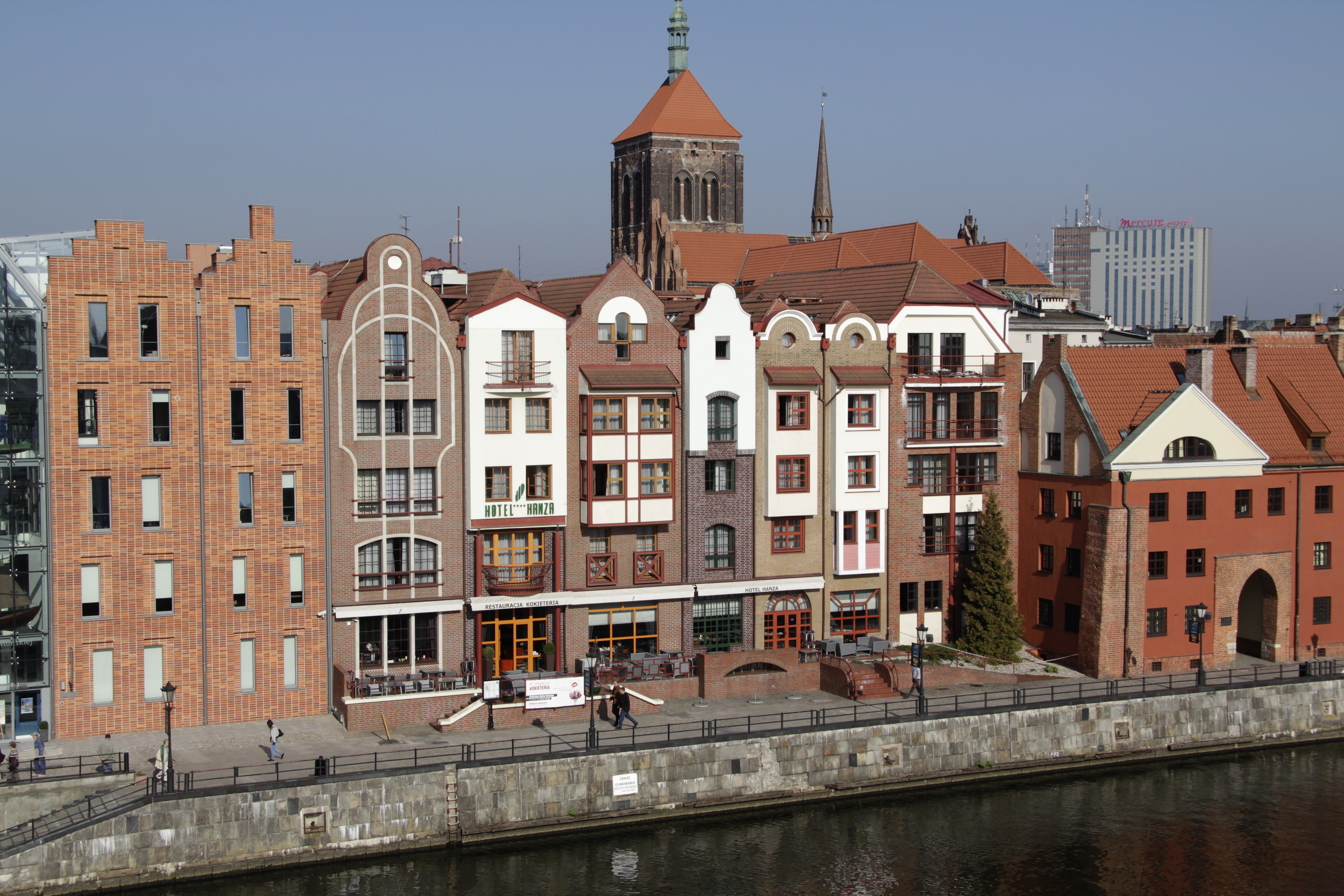 Hanza oferuje komfortowy wypoczynek w bardzo atrakcyjnej lokalizacji w Gdańsku. Hotel znajduje się obok słynnego, charakterystycznego żurawia portowego i przystani, co zapewnia niezwykłą atmosferę, atrakcyjne widoki i szybki dostęp do najpopularniejszych atrakcji Trójmiasta.